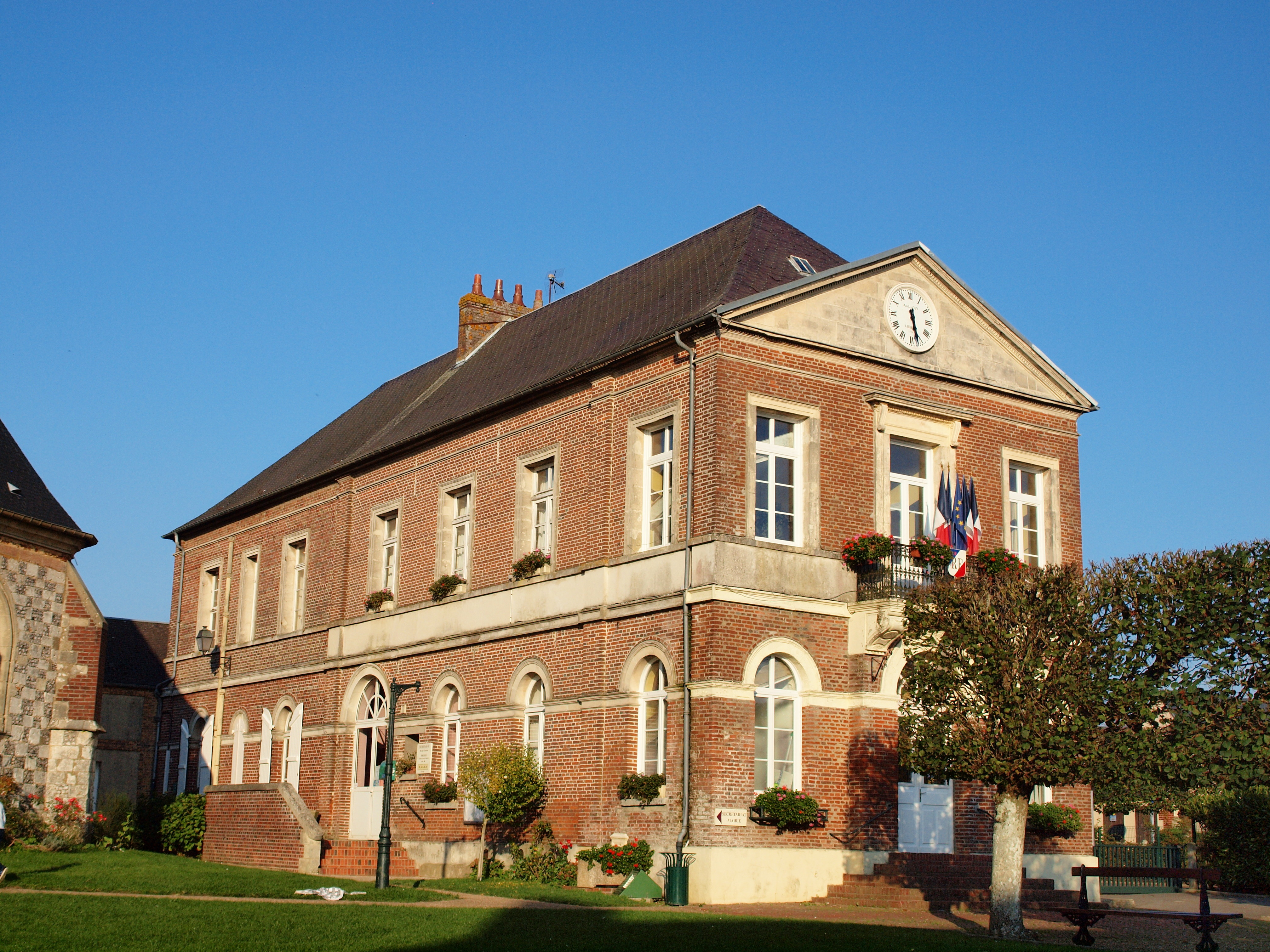 Le Couldray-en-Thelle, alias Le Coudray-Saint-Germer (Oise, France)